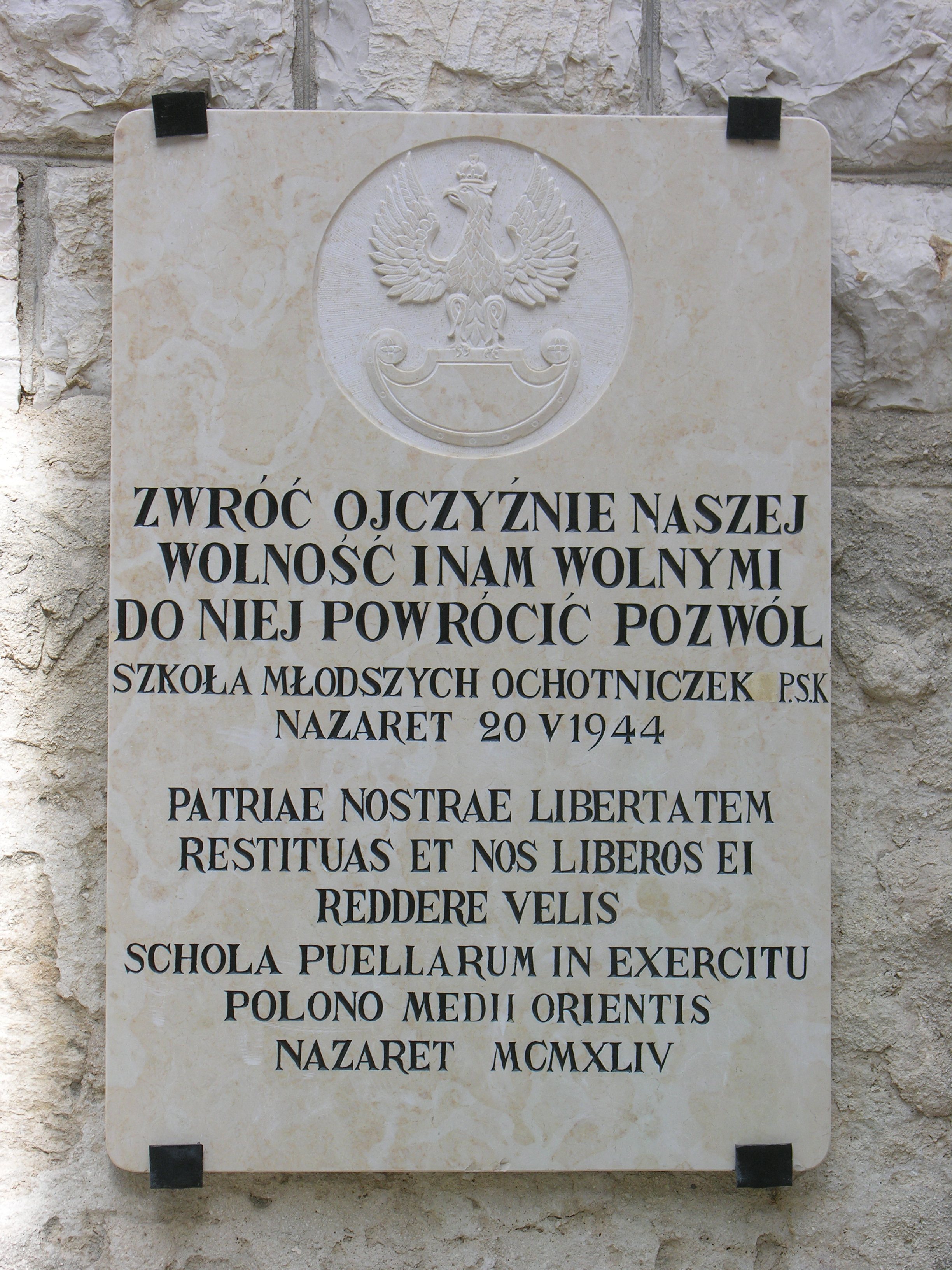 Tablica upamiętniająca szkołę ochotniczek Pomocniczej Służby Kobiet w Nazarecie